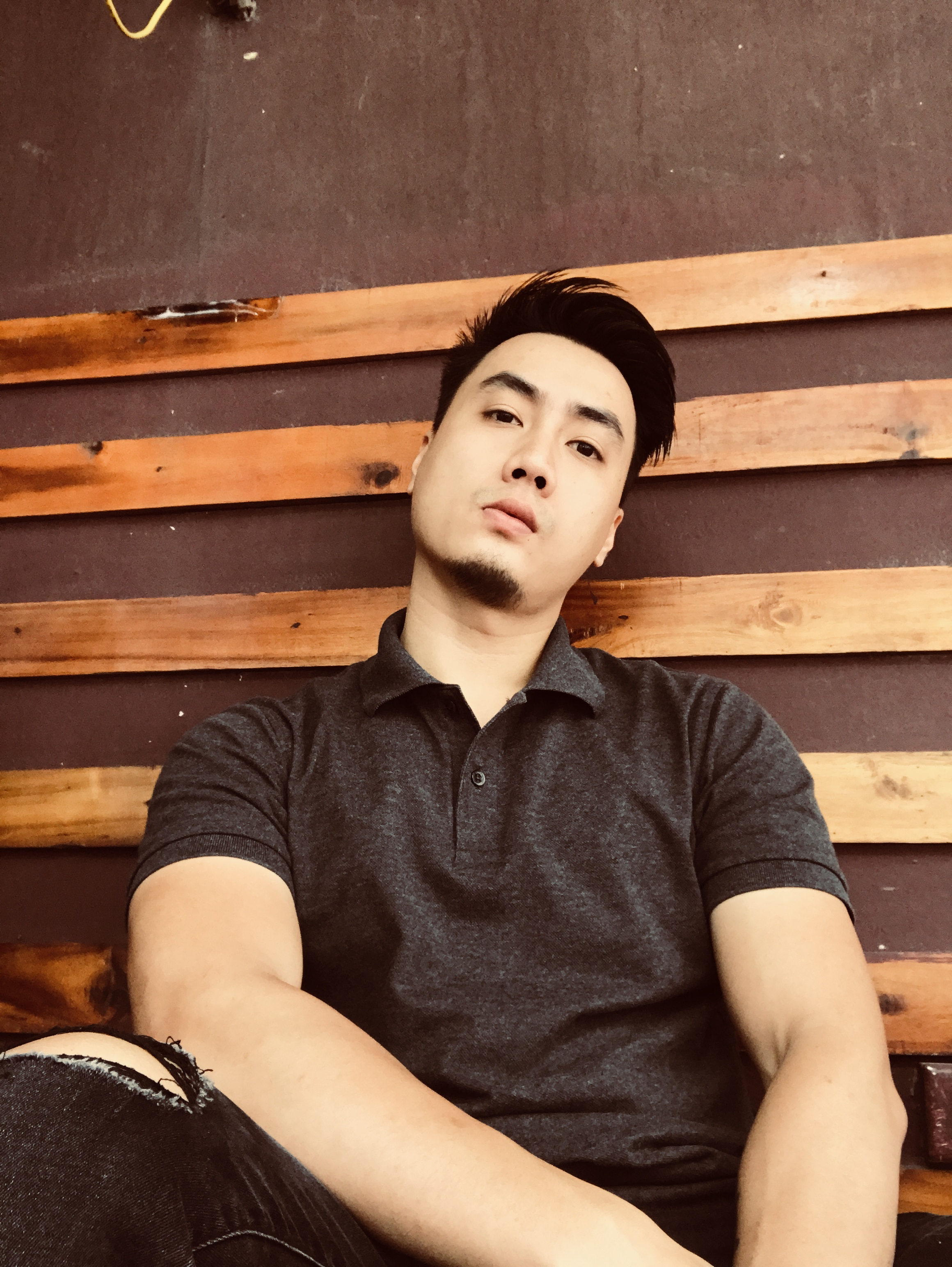 huy phạm